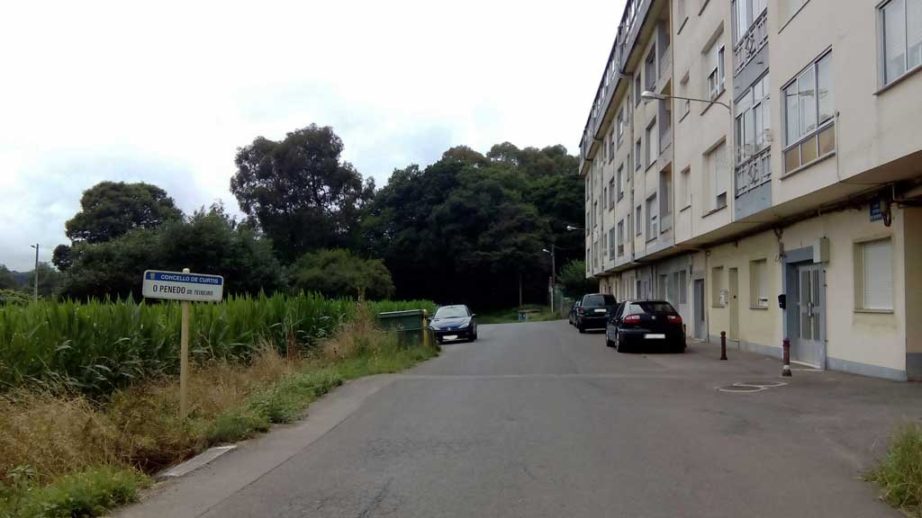 Vista do Penedo de Teixeiro, Curtis.